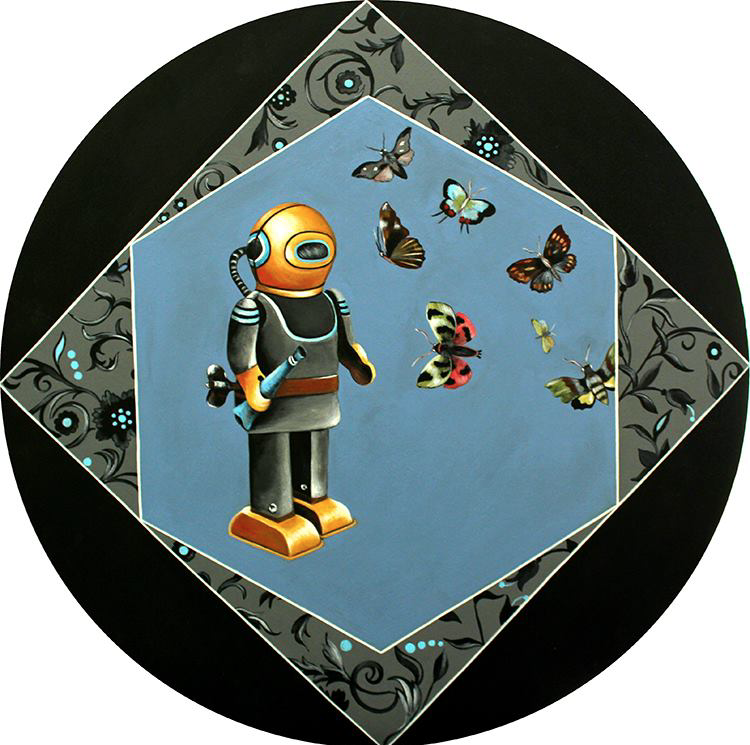 Perfetto accordo di Emma Anticoli Borza